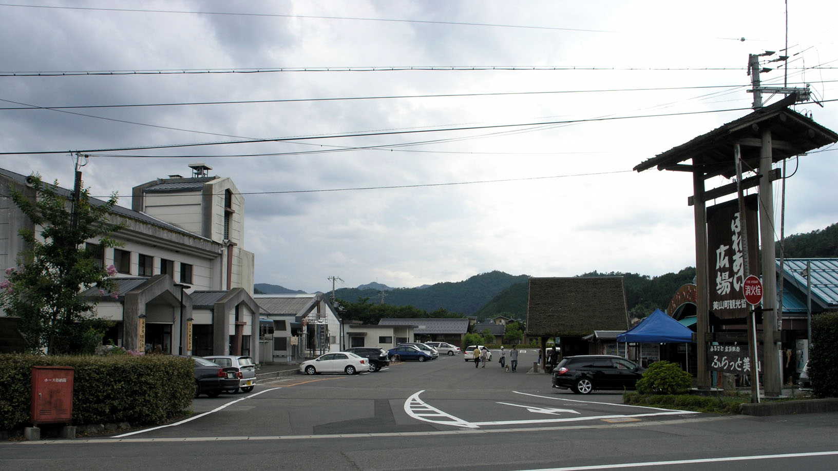 道の駅美山ふれあい広場 (京都府南丹市) 2008年8月撮影。 機材：C8080WZ 撮影者：Kansai explorer